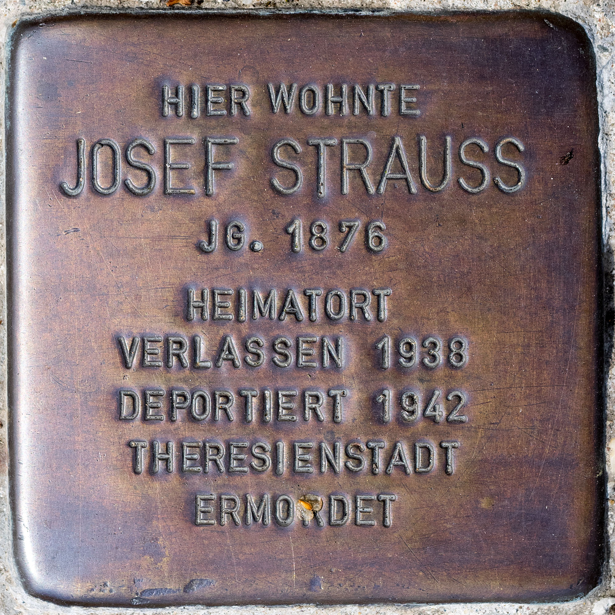 Stolpersteine Roki: Strauss, Josef